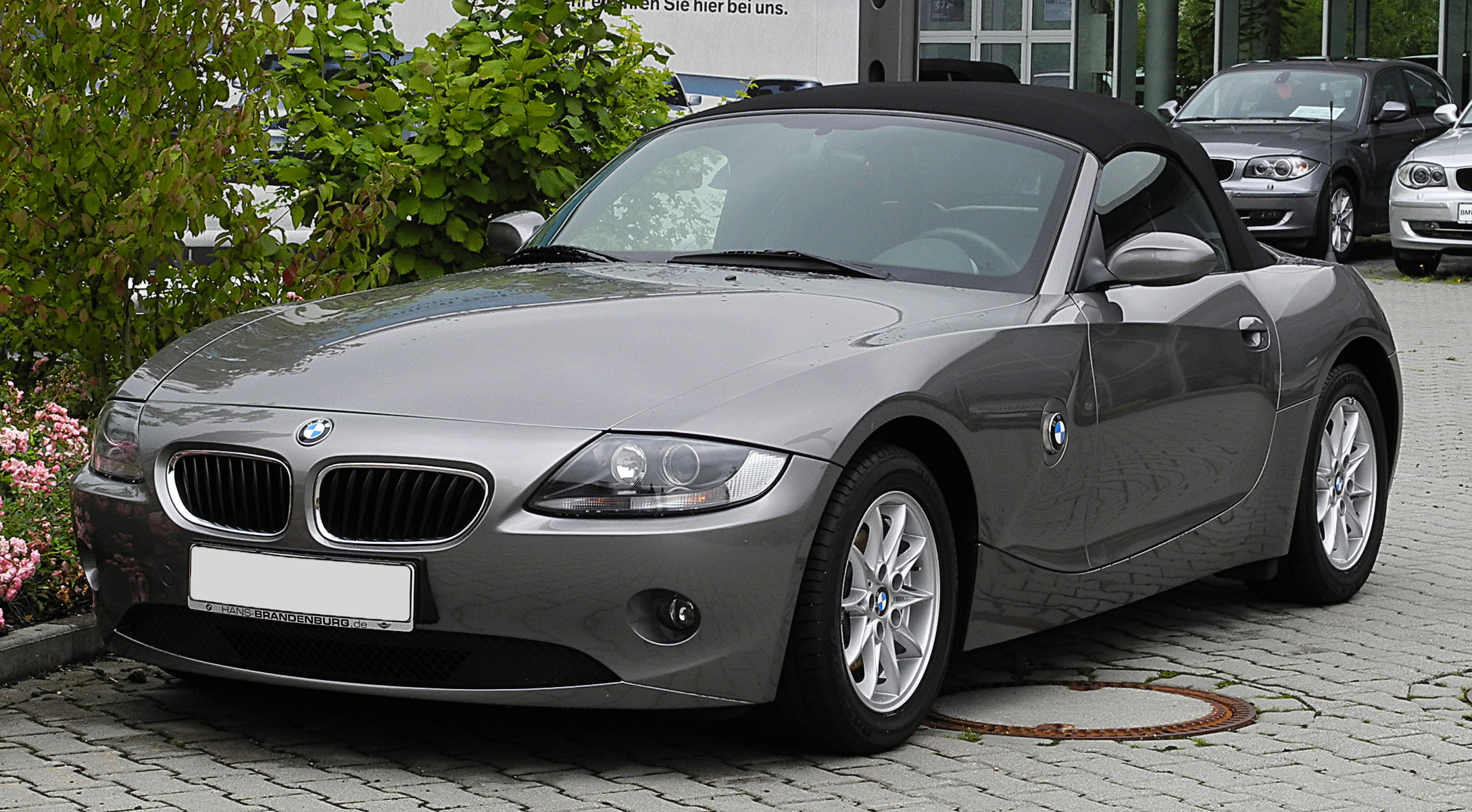 BMW Z4 2.2i (E85)